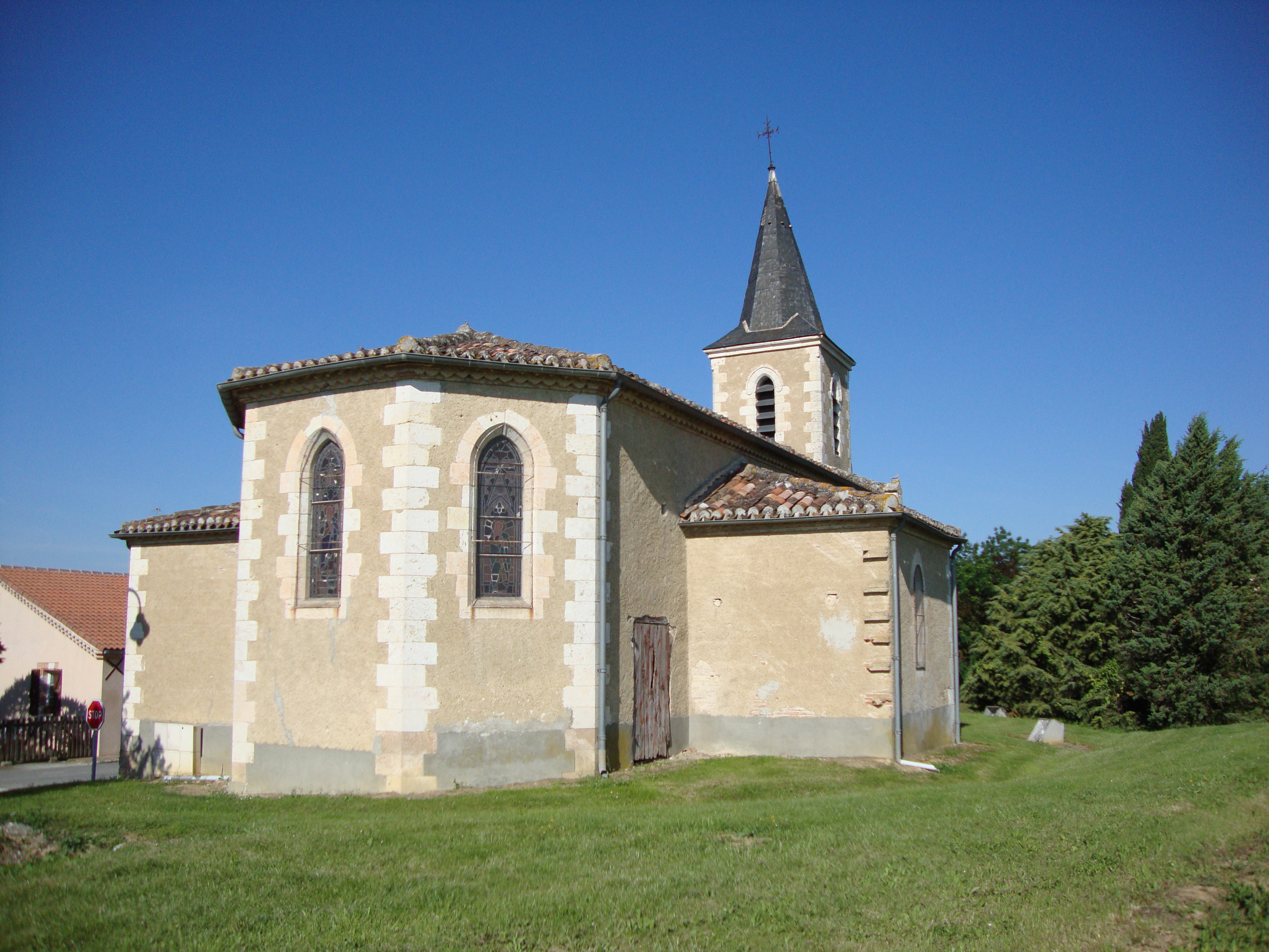 Giscaro (Gers, Fr) église côté chevet